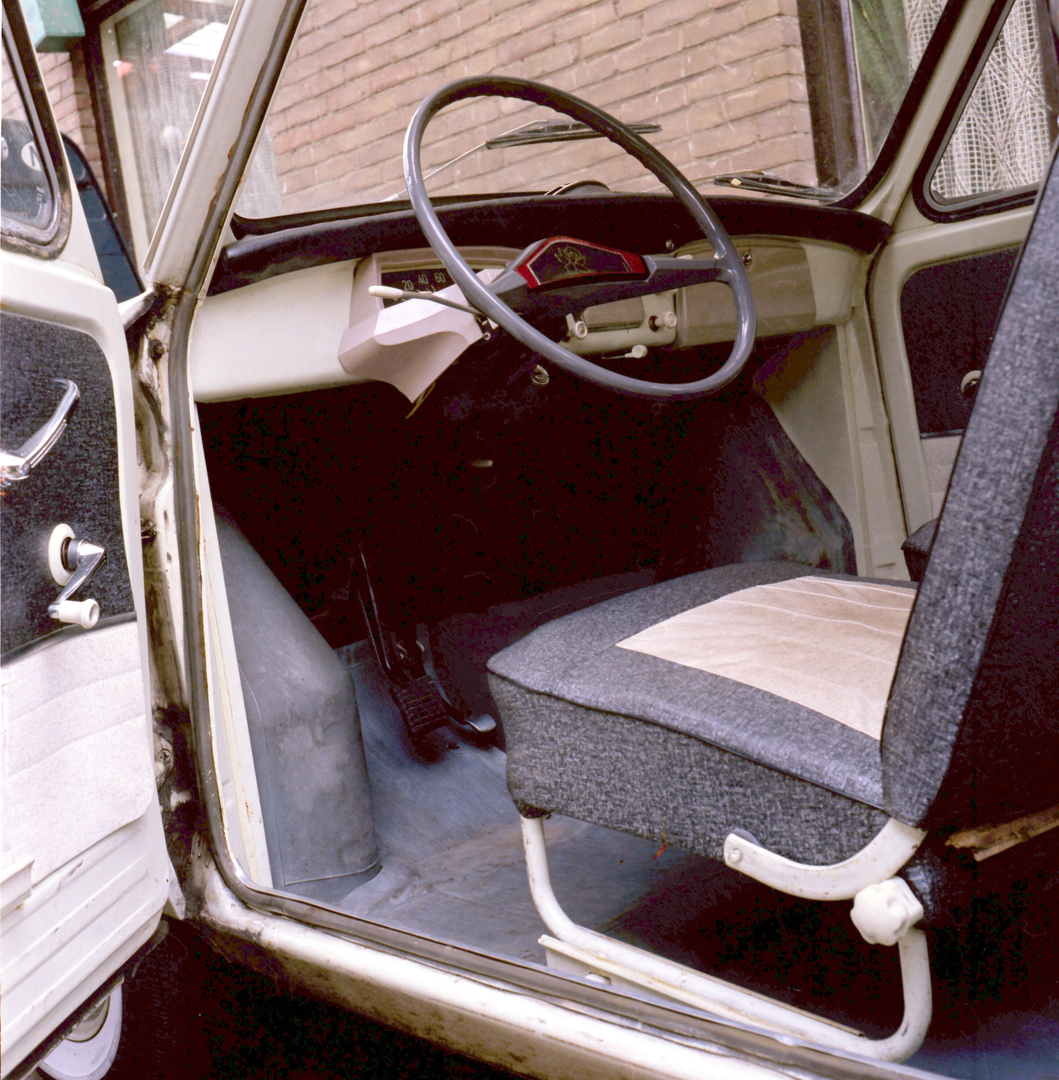 Daf 750 Daffodil from 1961